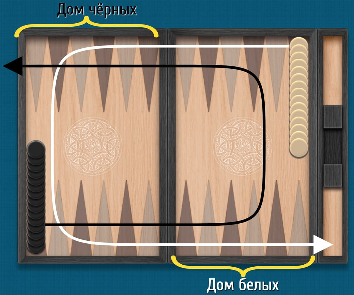 Направление движения